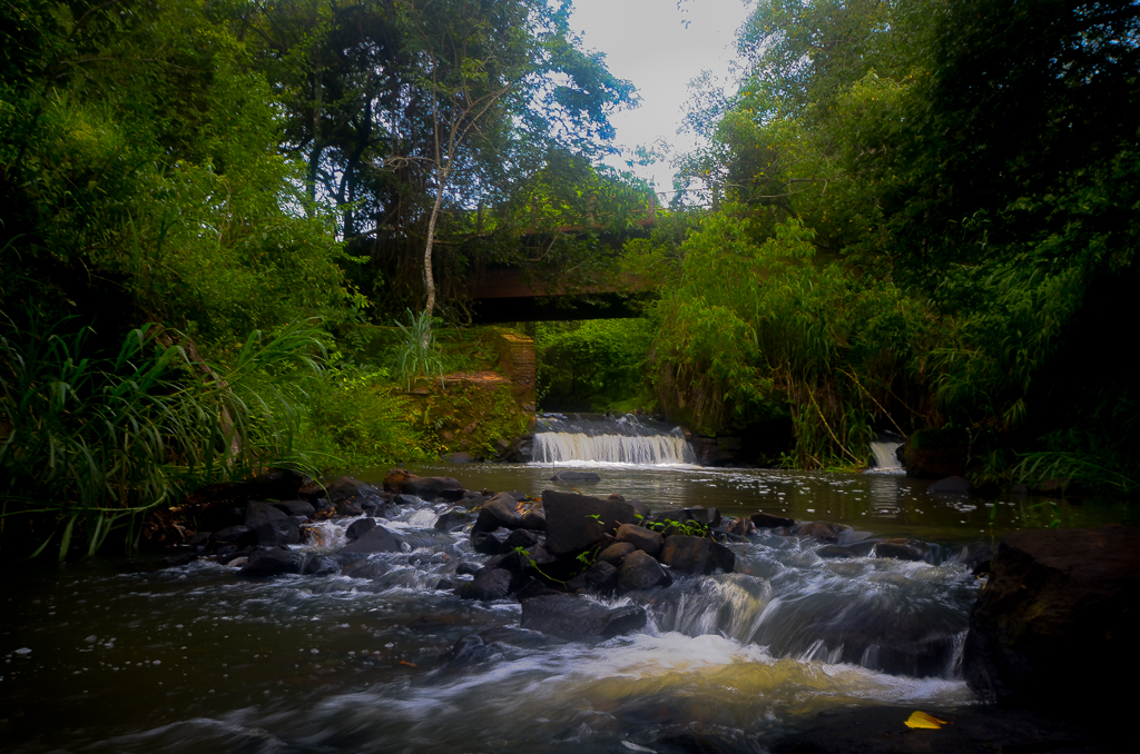 Esse é o Rio das Pedras afluente do Rio Mogi Guaçu